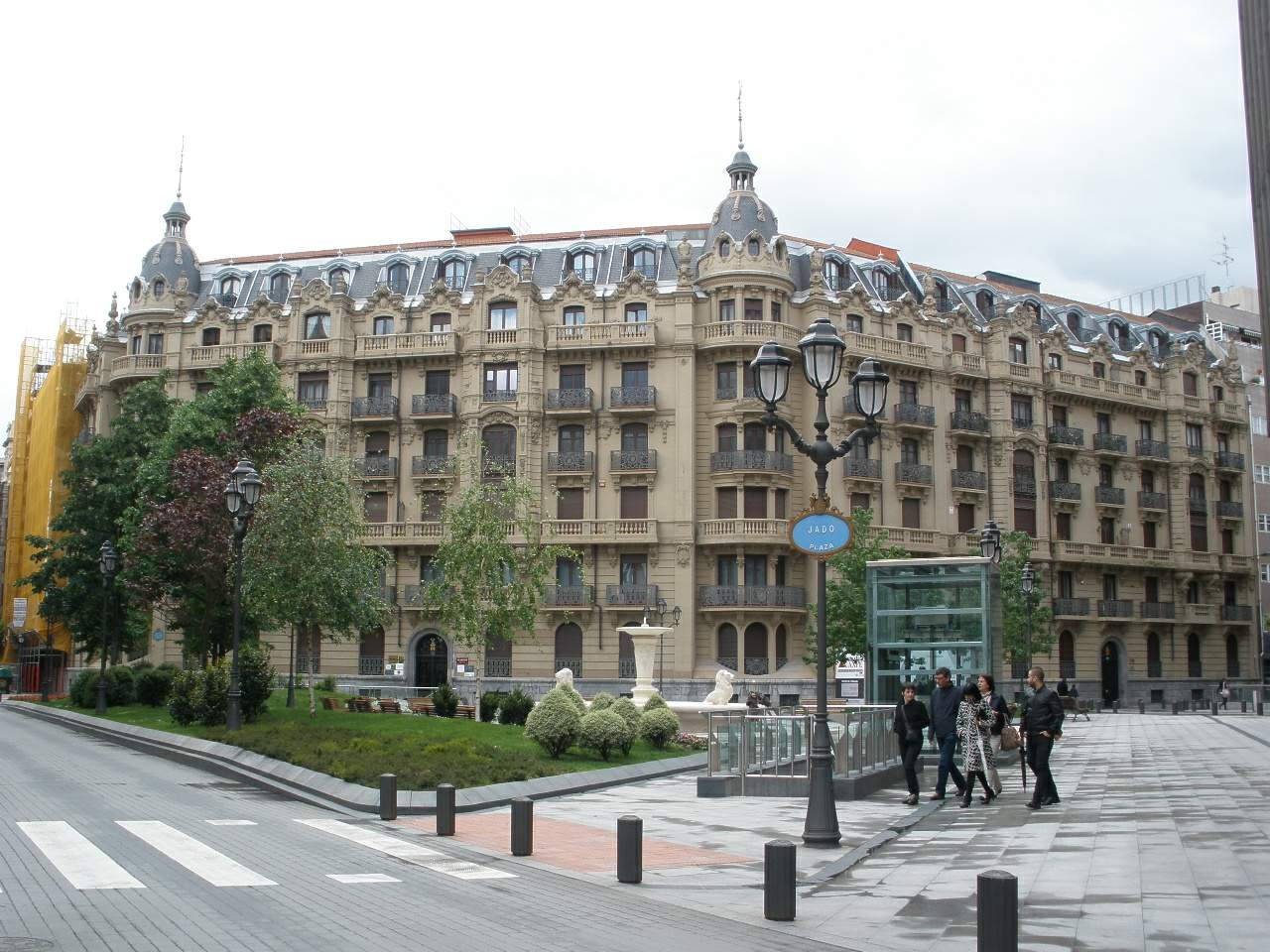 Plaza de Jado (Bilbao)